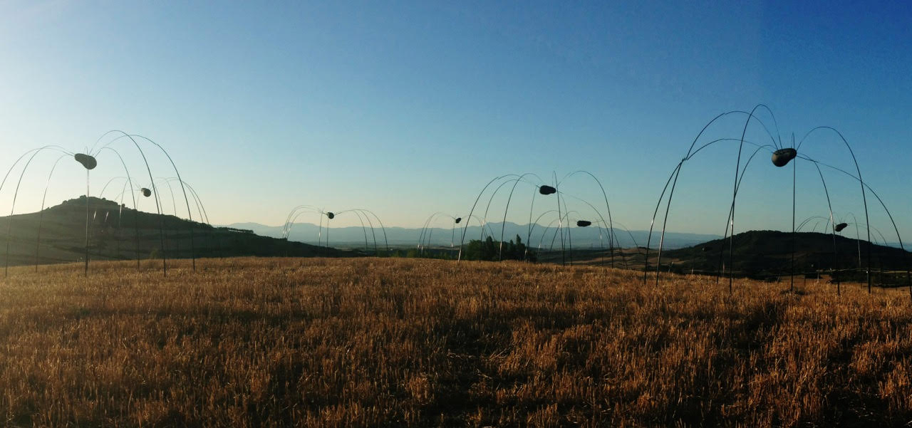 LoiLoi 2017 Fibra de vídrio, cartón-piedra, hierro. 12 piezas con alturas de 2,5 a 3,5 m.